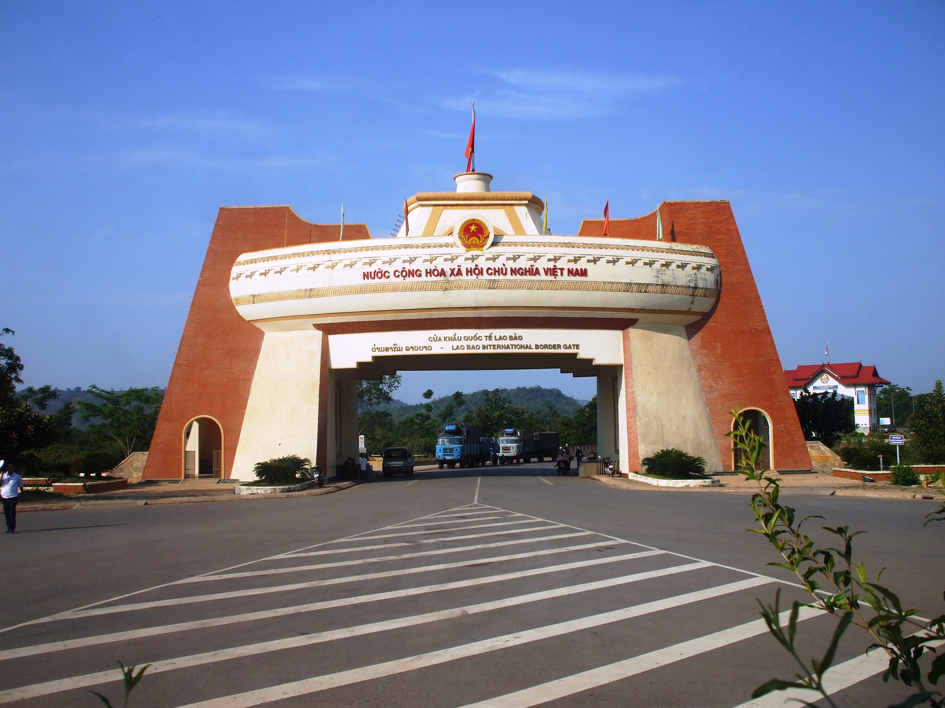 Cửa khẩu quốc tế Lao Bảo (Quảng Trị, Việt Nam)